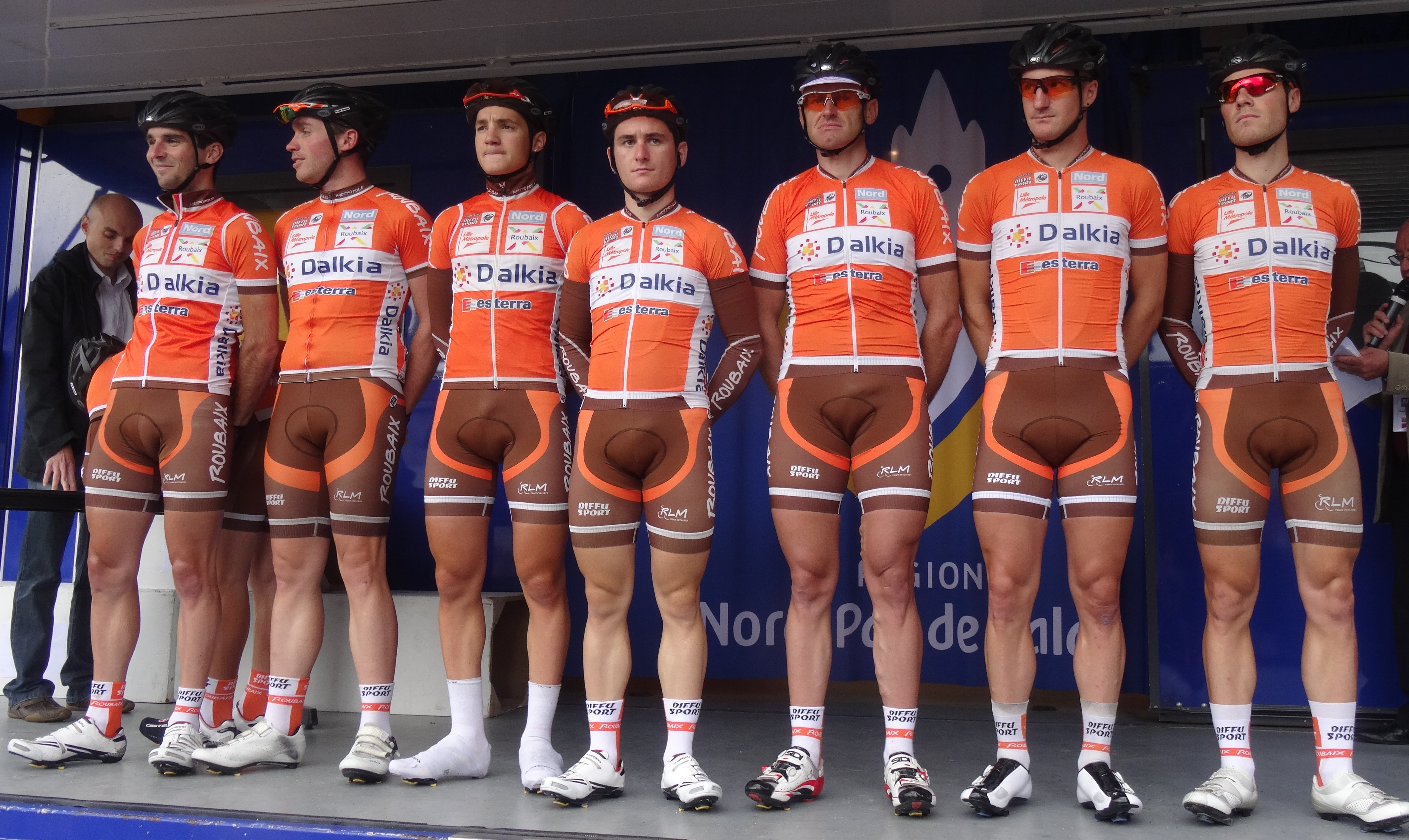 Reportage photographique réalisé le dimanche 13 juillet à l'occasion du départ et de l'arrivée de la Ronde pévéloise 2014 à Pont-à-Marcq, Nord-Pas-de-Calais, France.